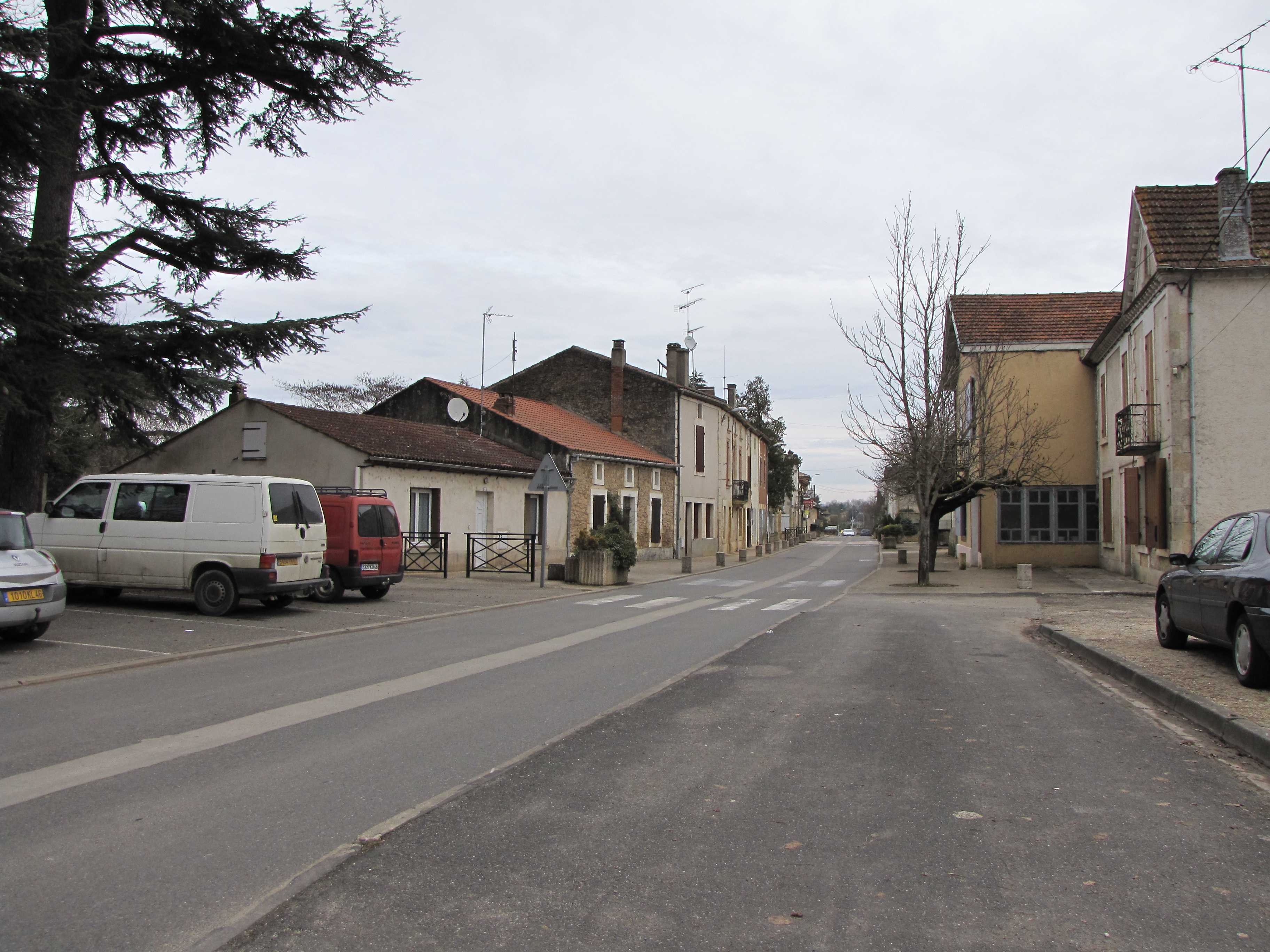 Saint-Vite